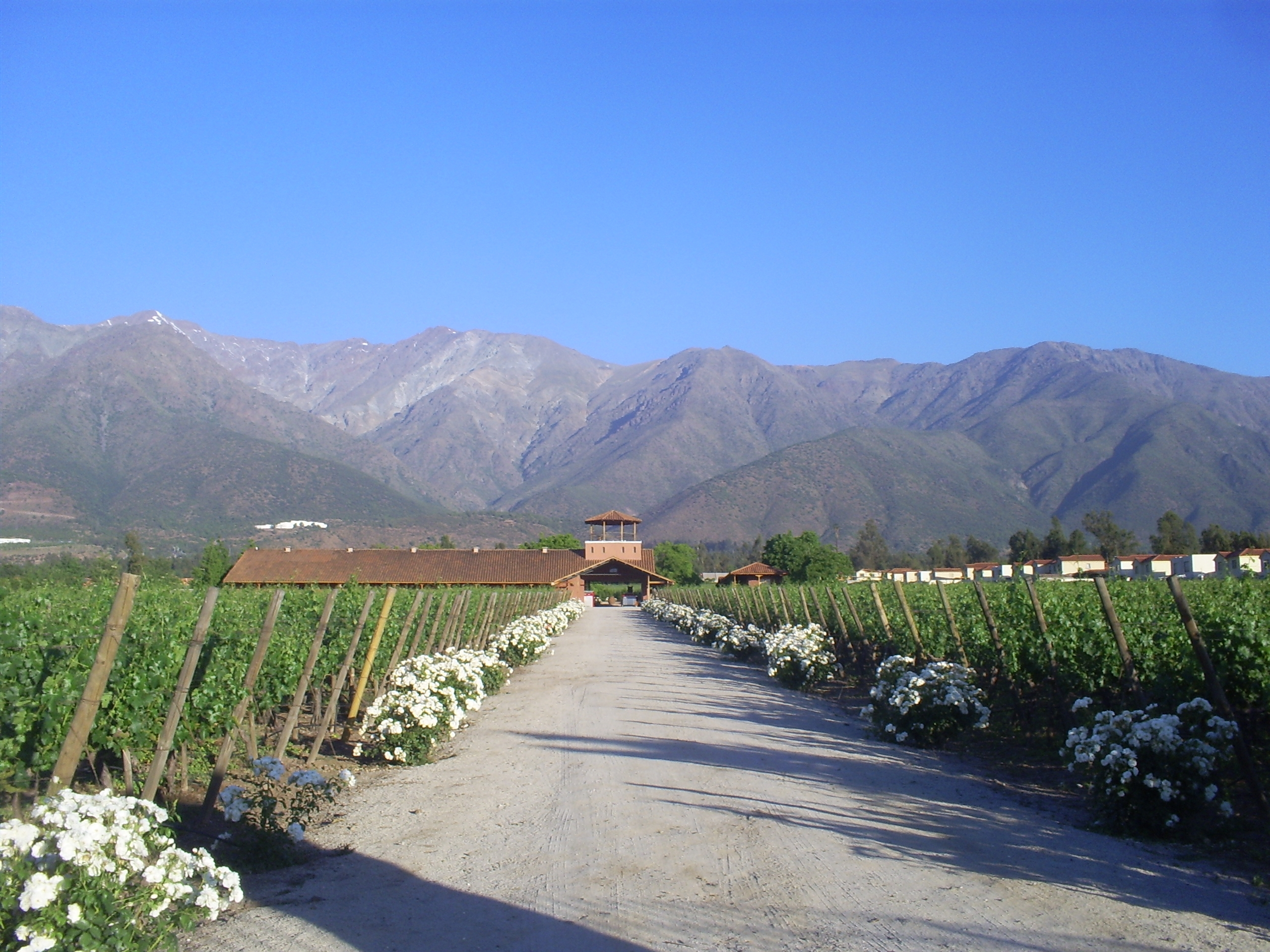 Viña "Aquitania" en la comuna de Peñalolén, Santiago, Chile.